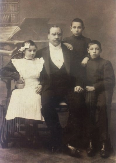 Николай Сергеевич Каринский (1873-1948) с детьми Татьяной, Львом и Евгением, 1907 год, Россия